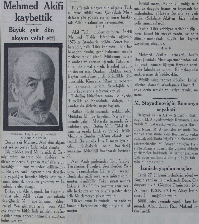 Mehmed Akif'in ölümü ile ilgili bir gazete haberi